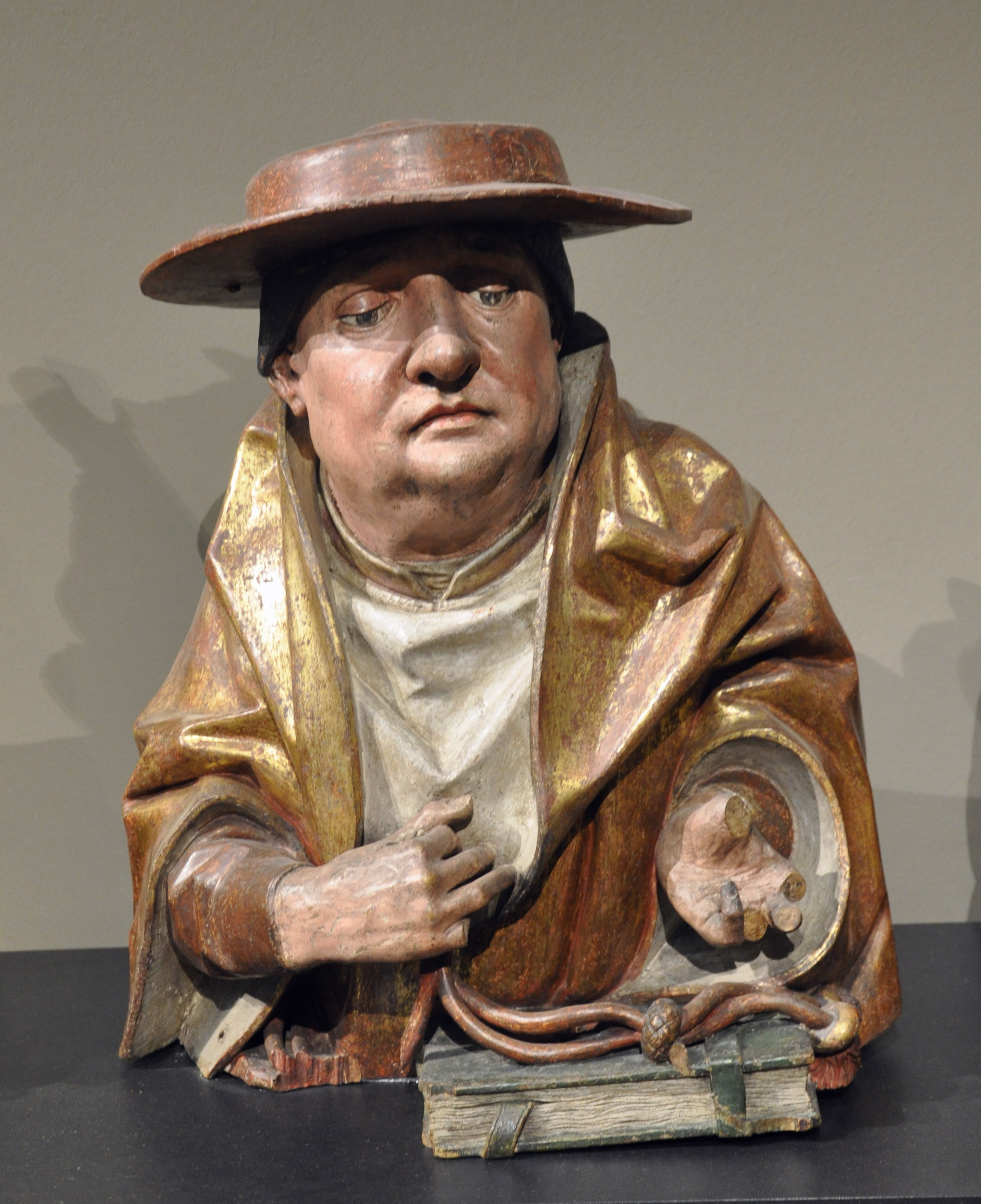 Hans Bilger: Büste des Kirchenvaters Hieronymus; Worms 1489-1496, Lindenholz, originale Farbfassung (barock überarbeitet) Liebieghaus, Frankfurt am Main, Inv. St. P. 121